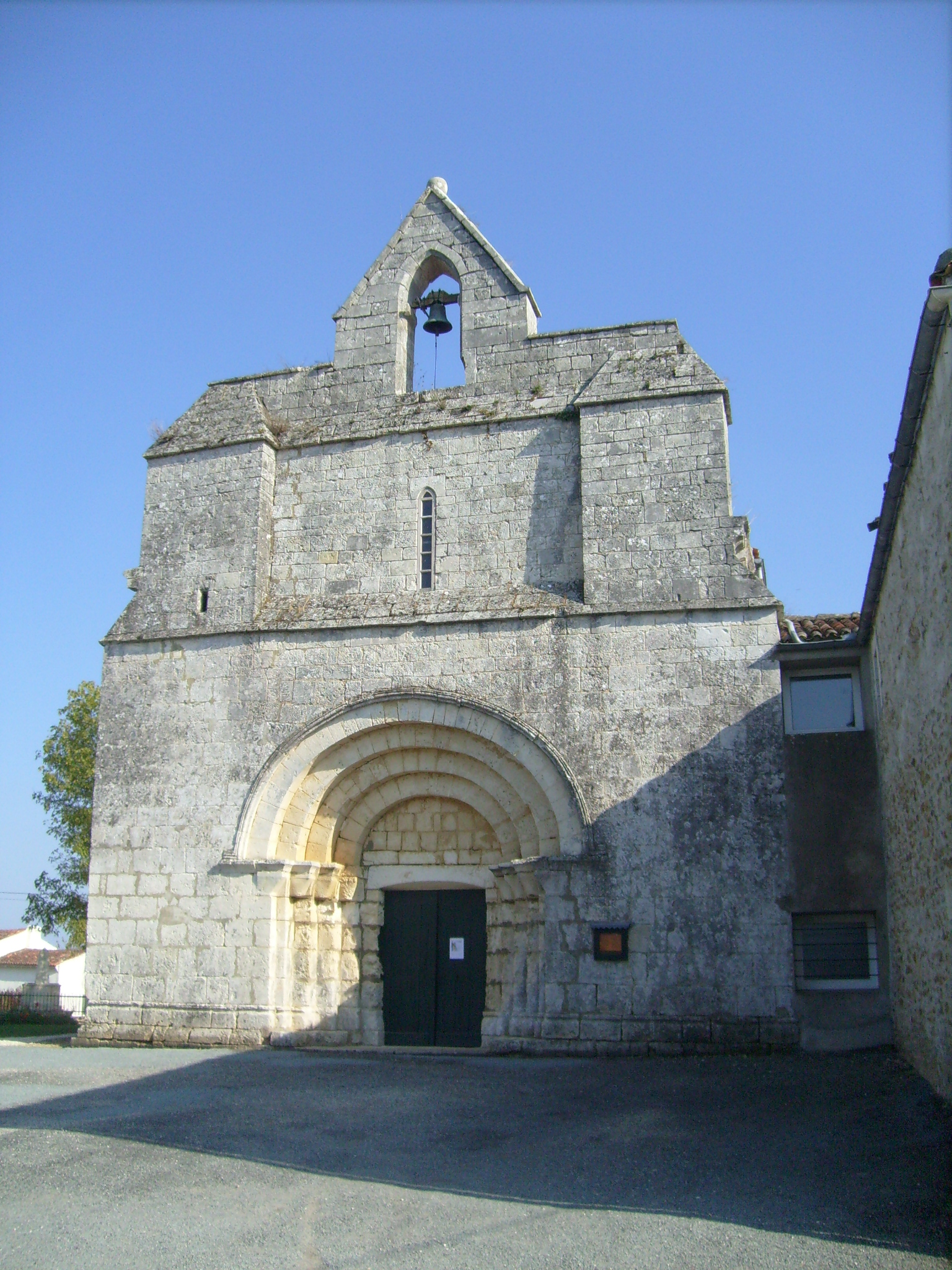 Façade de l'église de Luchat